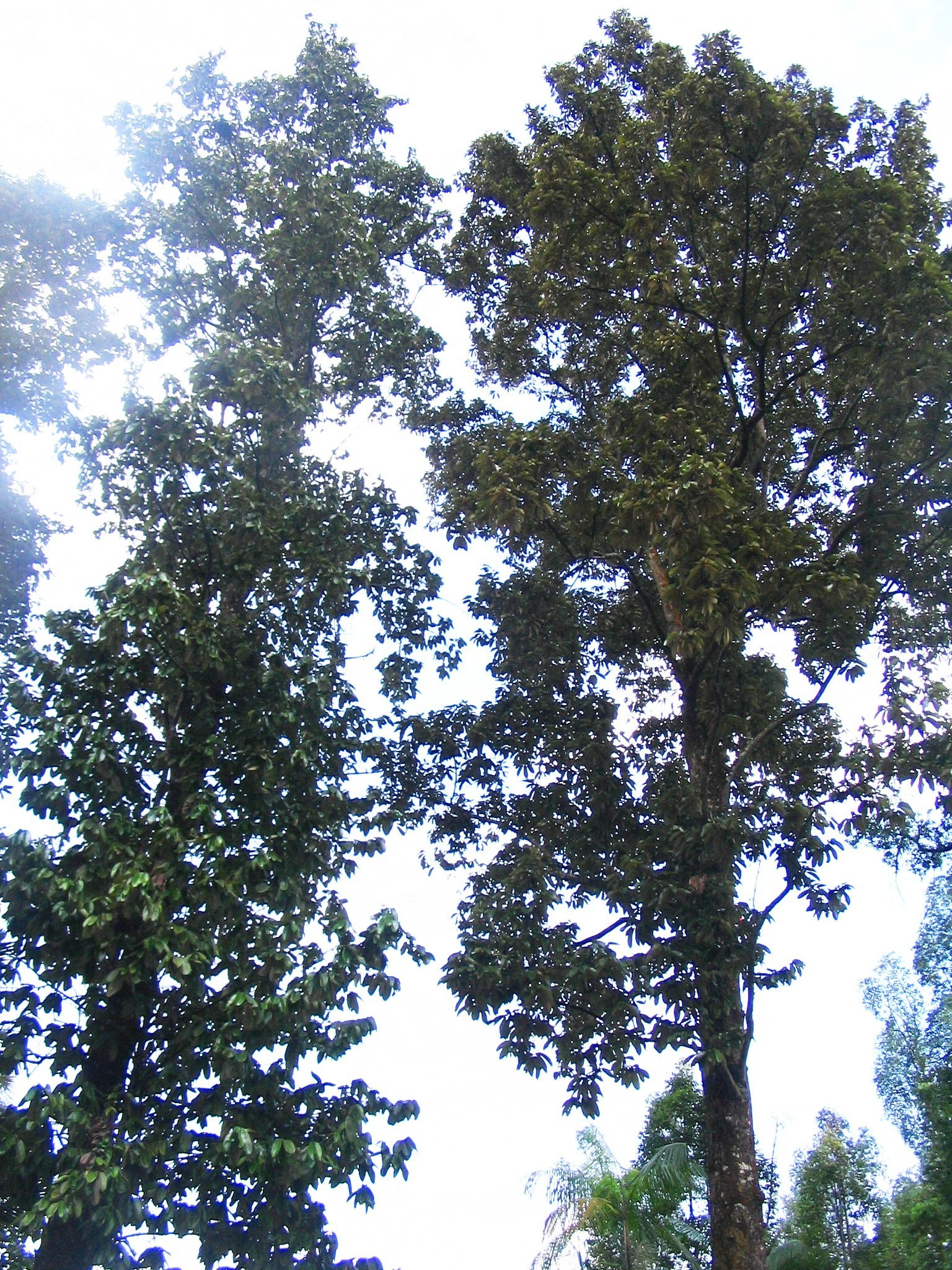 Upuna borneensis - Forest Resarch Institute of Malaysia